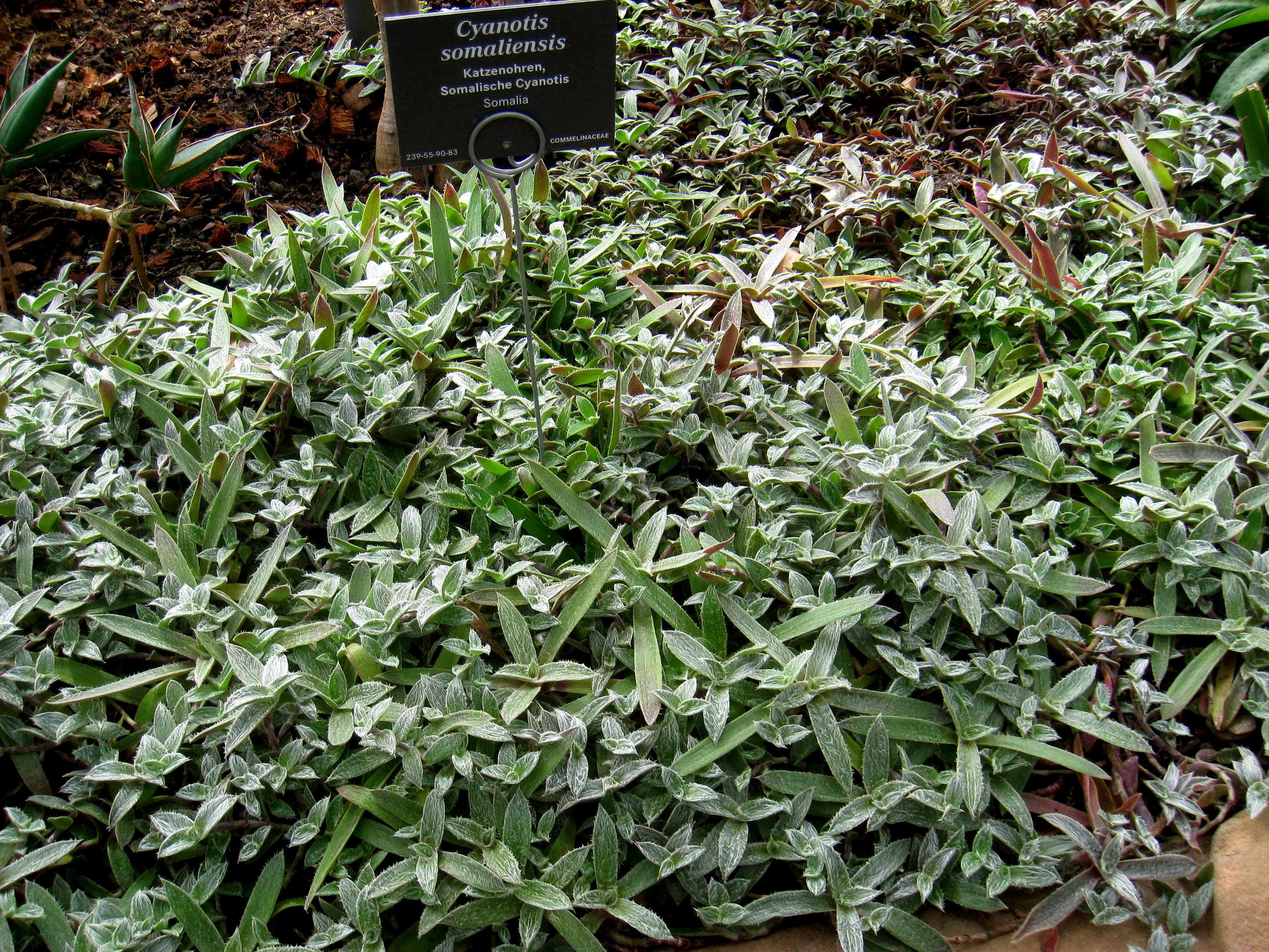 Cyanotis somaliensis specimen in the Botanischer Garten, Berlin-Dahlem (Berlin Botanical Garden), Berlin, Germany.